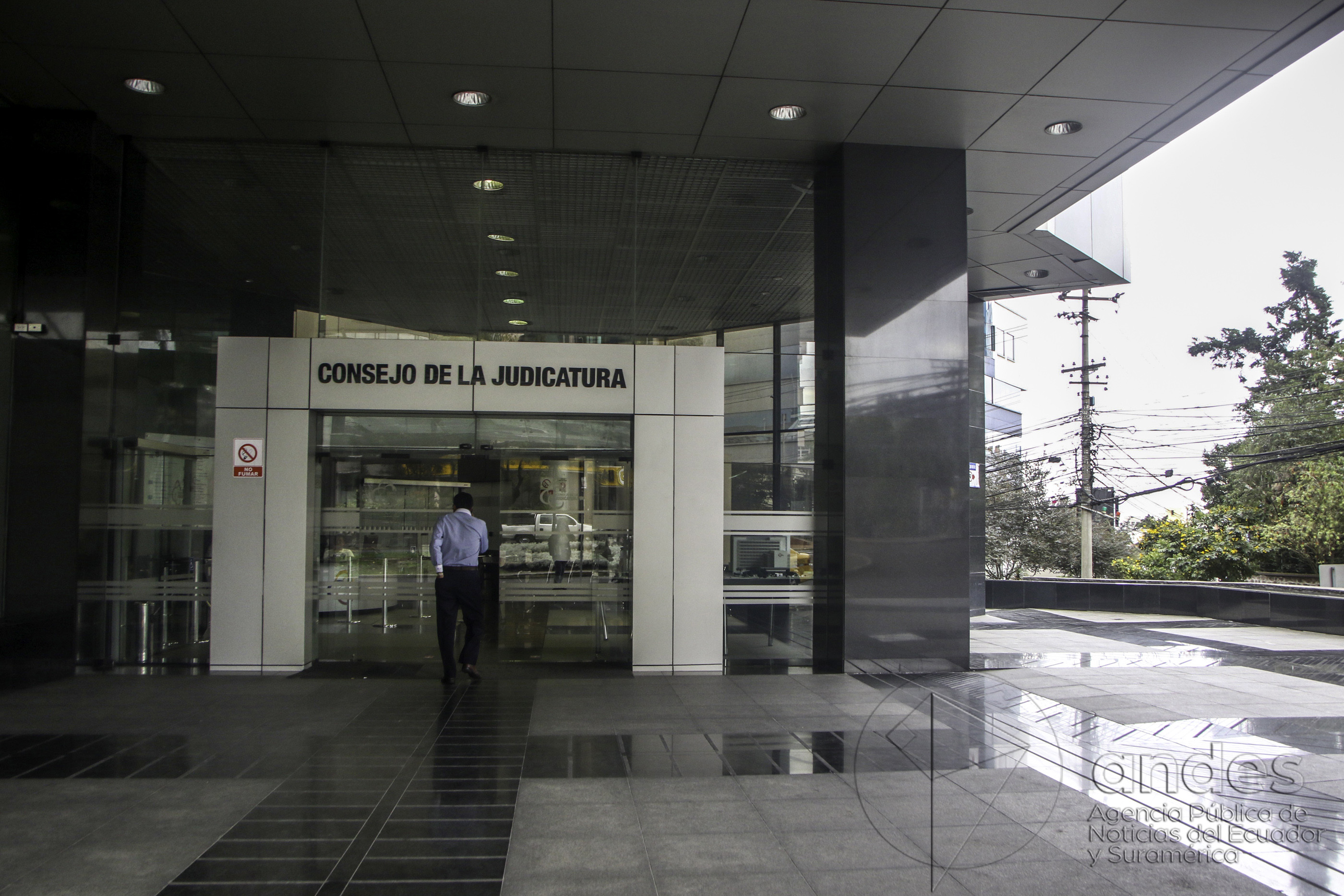 Quito, 06 de febrero de 2017 (Andes).- Av. 12 de Octubre N24-563 y Francisco Salazar. Quito. Pichincha. 593. Ecuador. ANDES/Micaela Ayala V.